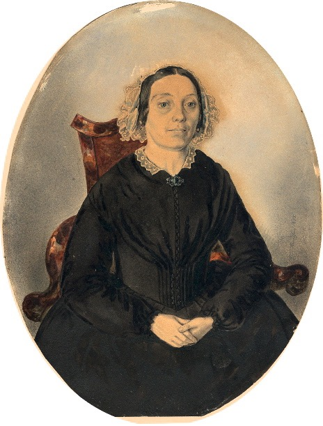 Malt av Hans Christian Knudsen